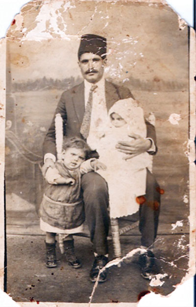 Ahmet Latif Bacavuz, 1935 yılında K.Kaymaklı’dan ailesi ile birlikte İzmir’e göç eder; 1936 yılında geçirdiği bir iş kazasında ölür ve İzmir’e gömülür. Ahmet Latif Bacavuz, Hamitköy’ün kurucusu Hamit Buba’nın kızı, Alime’nin oğludur. Ahmet Latif Bacavuz’un torunları İzmir ve Adana’da yaşıyor, Mualla Dinçer isimli kızı hayattadır ve İzmir’de yaşıyor. 2010 yılında bu aile ile temas kuruldu ve bu fotoğraf Adana’dan Kıbrıs’a getirildi. Ahmet Latif Bacavuz’un erkek kardeşi Mehmet Bacavuz Taşeli de, 1935’li yıllarda Bursa’ya yerleşti. Mehmet Bacavuz Taşeli ailesi ile henüz bir temas kurulamadı. Ahmet Latif Bacavuz’un lakabı ‘Altın dişli’ idi. Kucağındaki kızının ismi Şifa, ayaktaki kızının ise Havva’dır.